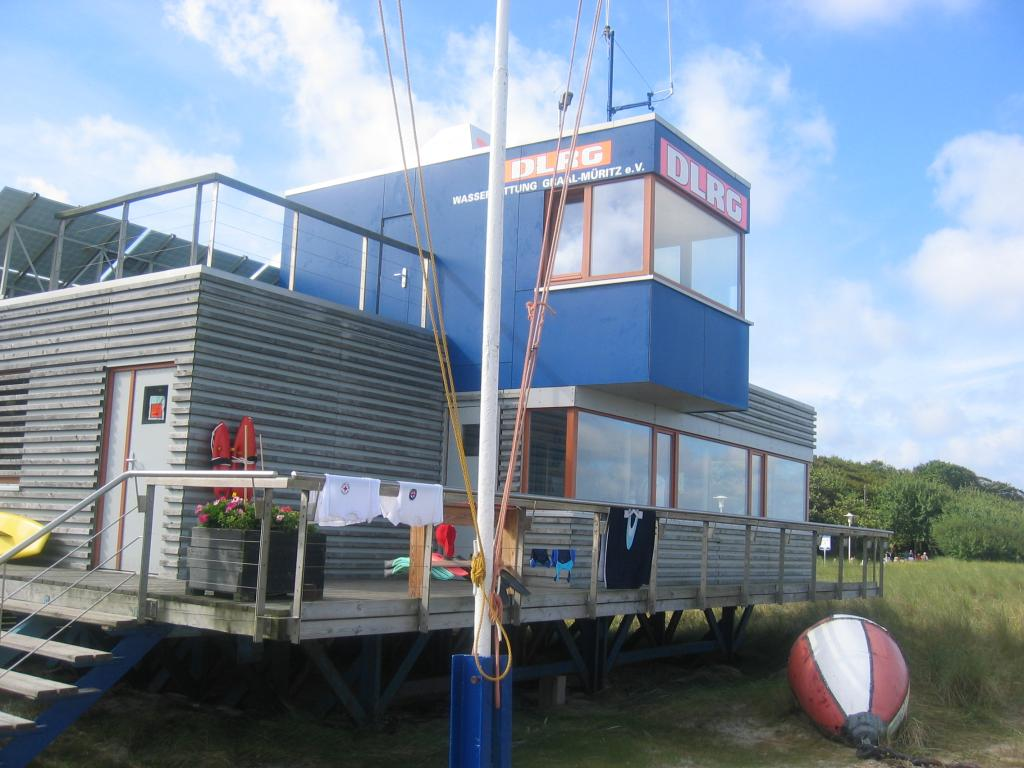 Wasserrettungsstation der DLRG am Strand von Graal-Müritz (Mecklenburg-Vorpommern)